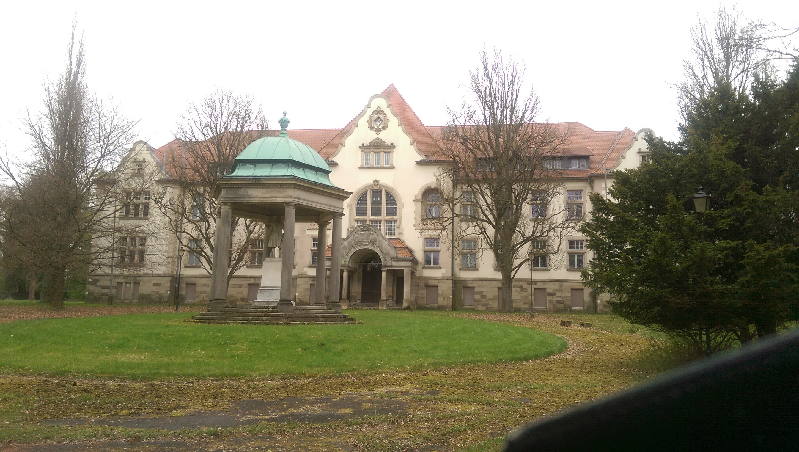 Hauptgebäude der Lenoir-Stiftung in Fürstenhagen